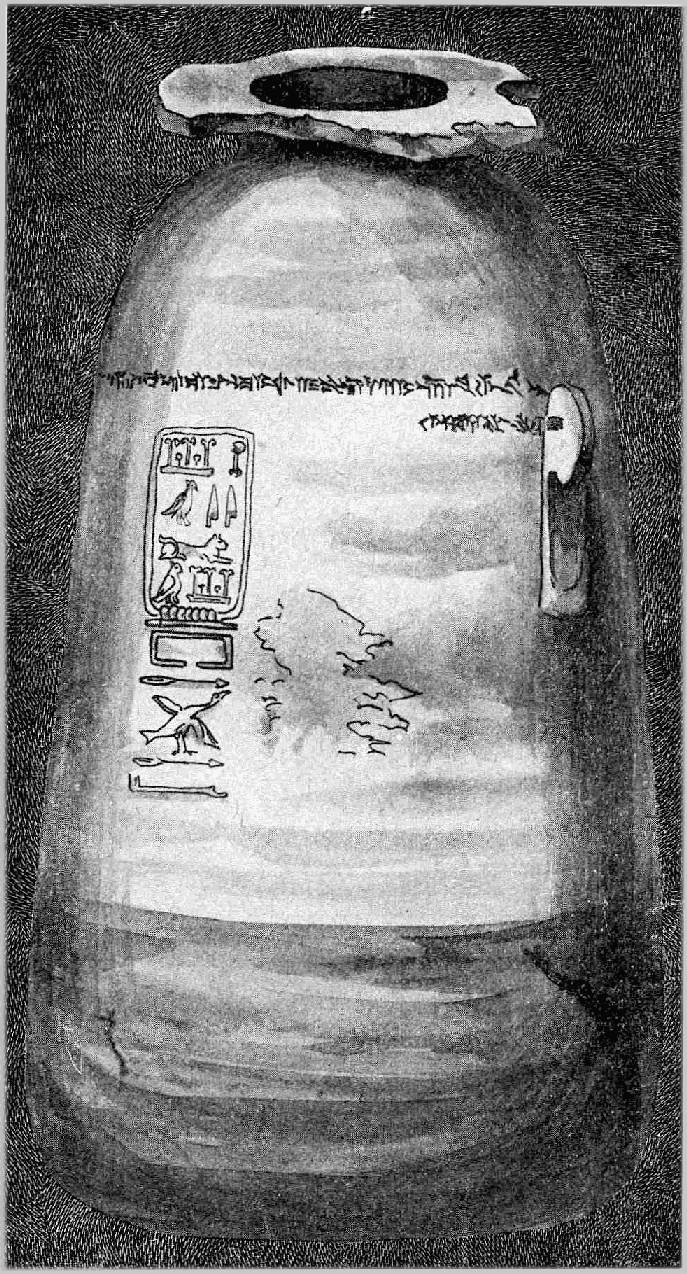 Xerxes Vase inscription (Cabinet des Médailles) Version compactée pour liseuse du fichier PNG du même nom